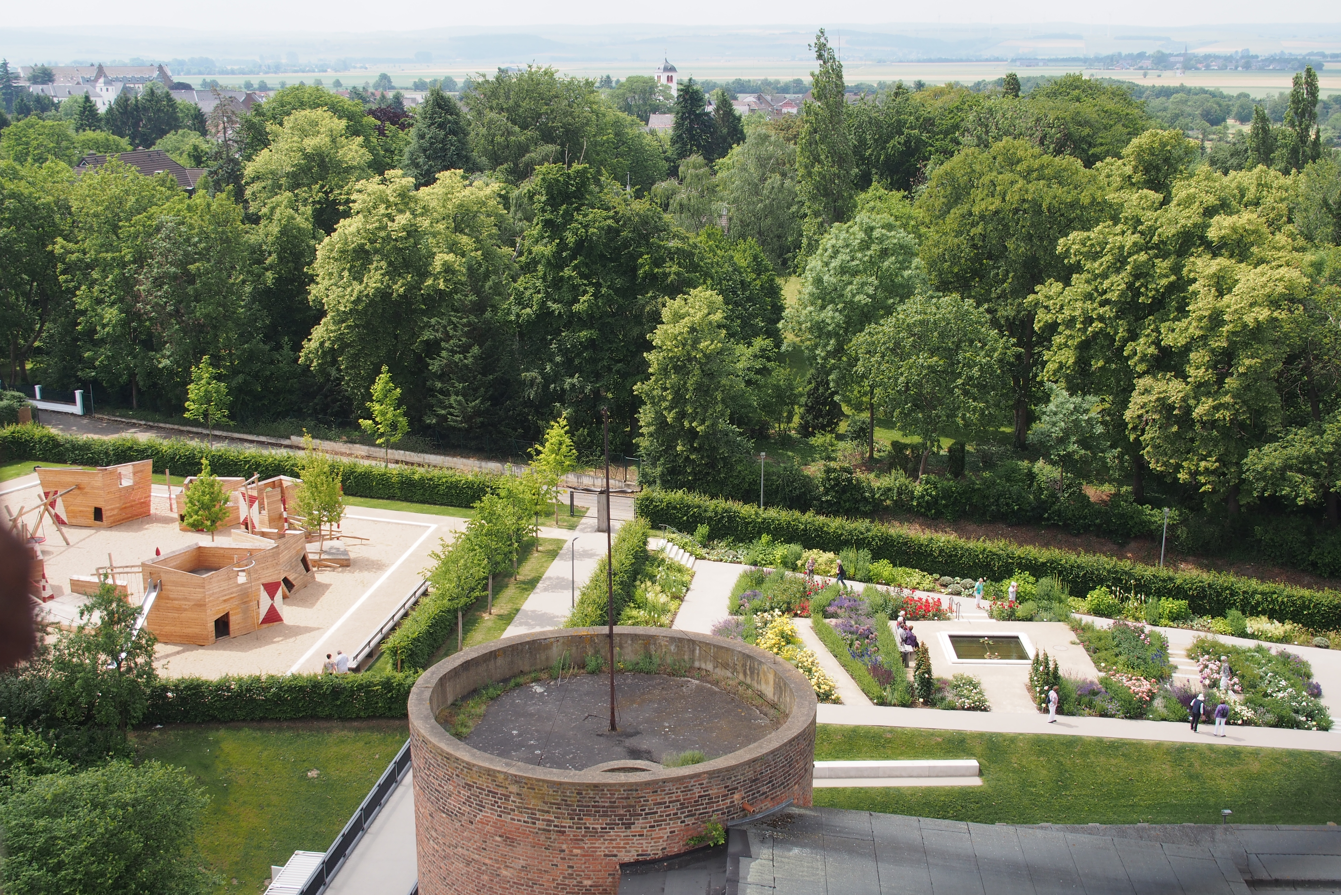 Rosengarten und Burgspielplatz vom Aussichtsturm der Landesburg